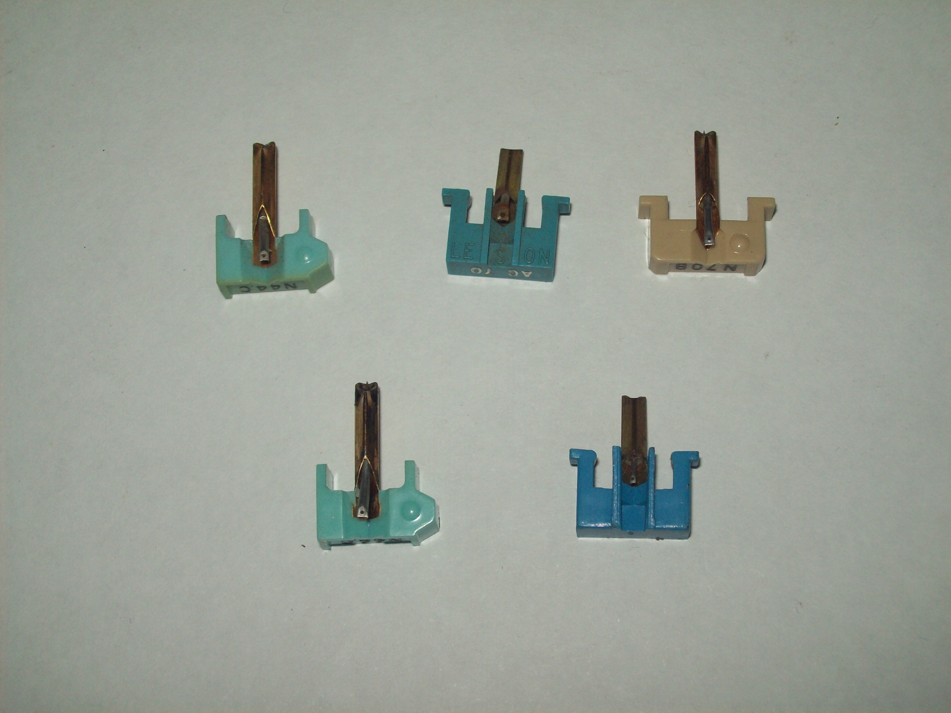 Son cinco puas de toca disco, marcas Shure y Leson (originales e imitación).